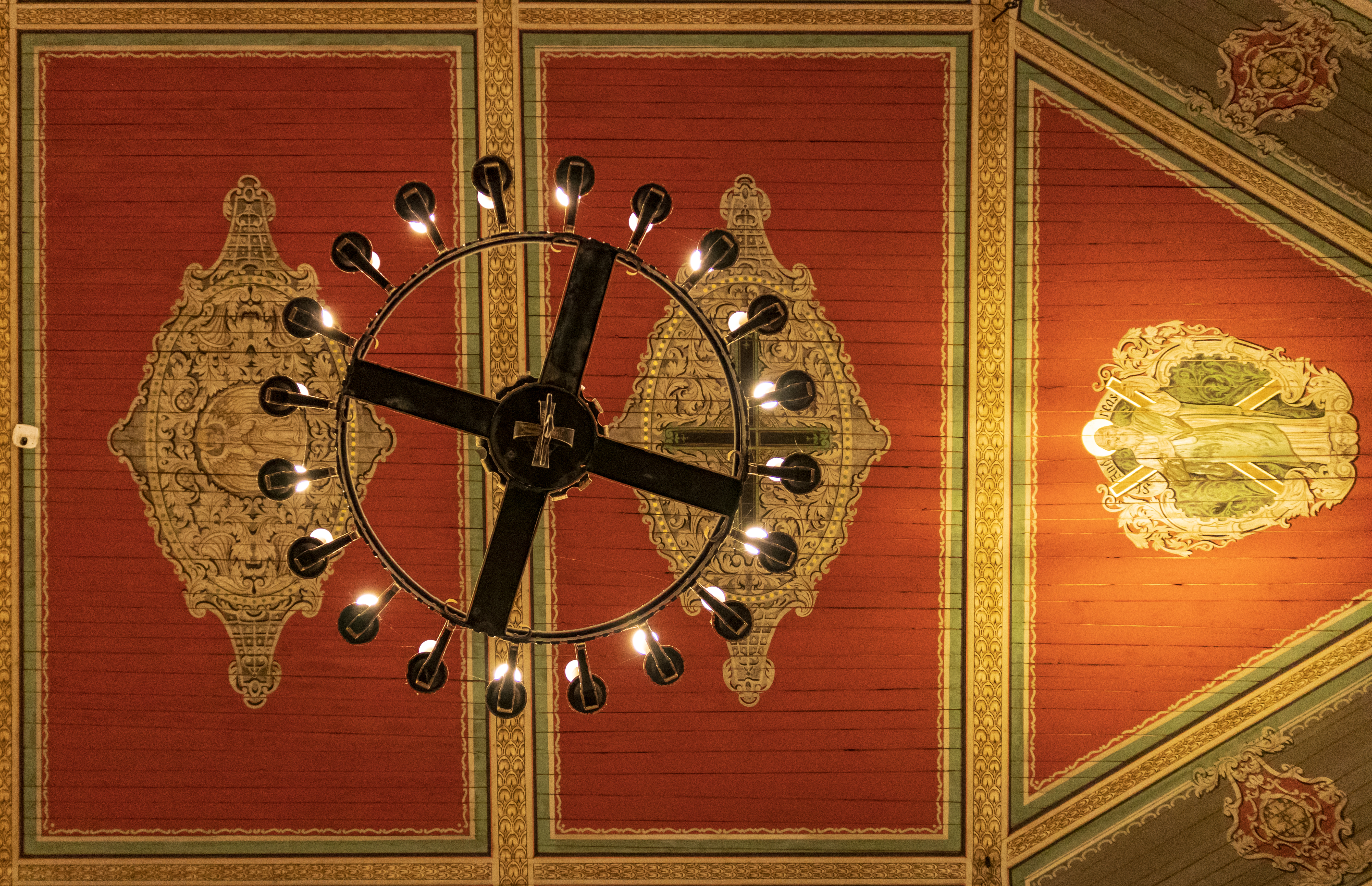 Die evangelisch-lutherische Kirche St. Andreas, eine nach dem Schutzpatron der Bergleute benannte Saalkirche, steht in der Fluchtlinie der Hauptstraße im historischen Stadtkern von Bad Lauterberg. Deckenansicht